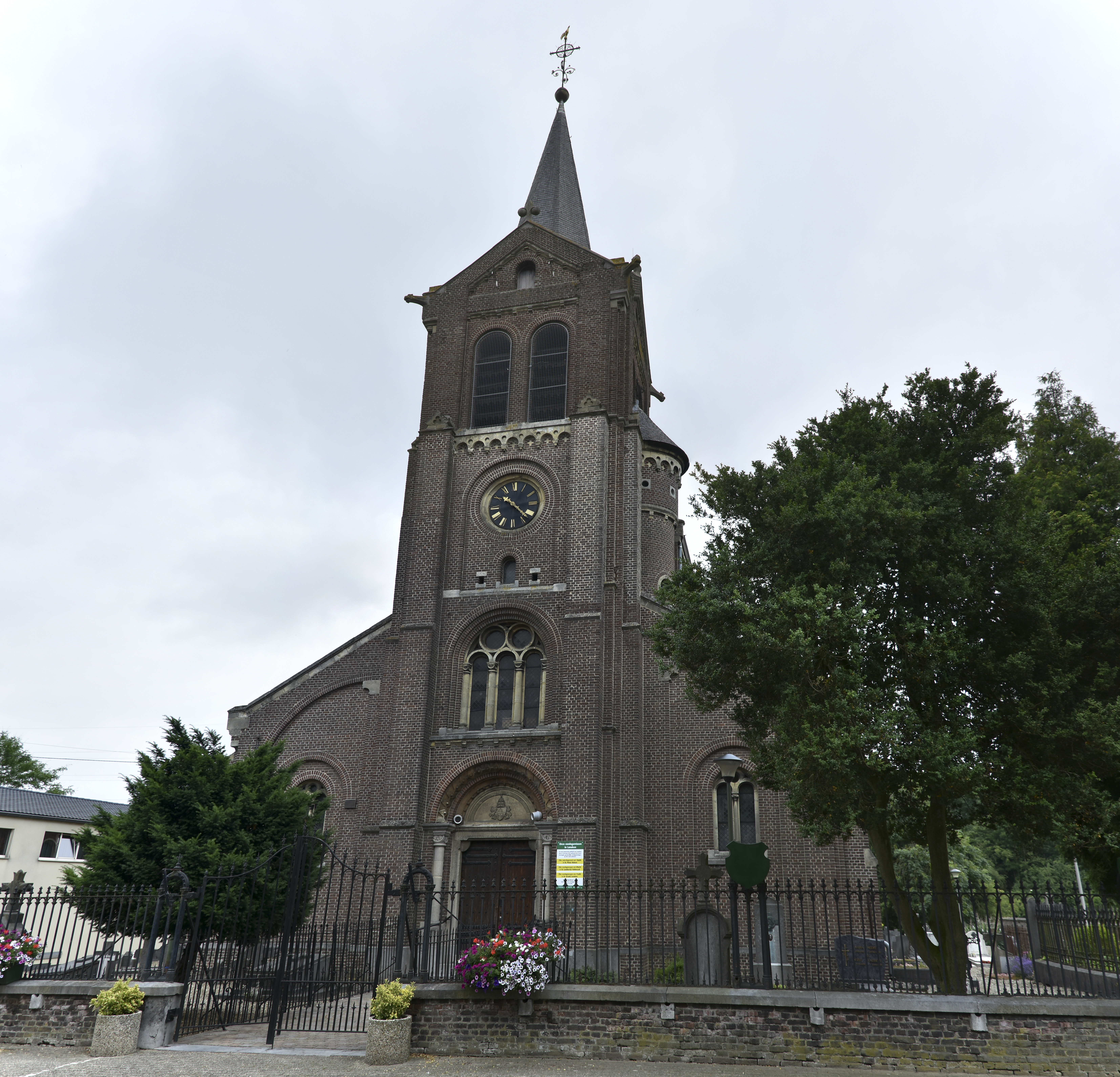 Sint-Lambertuskerk (Neerharen) 19-06-2018 10-22-14 This photo of immovable heritage has been taken in the Flemish Region